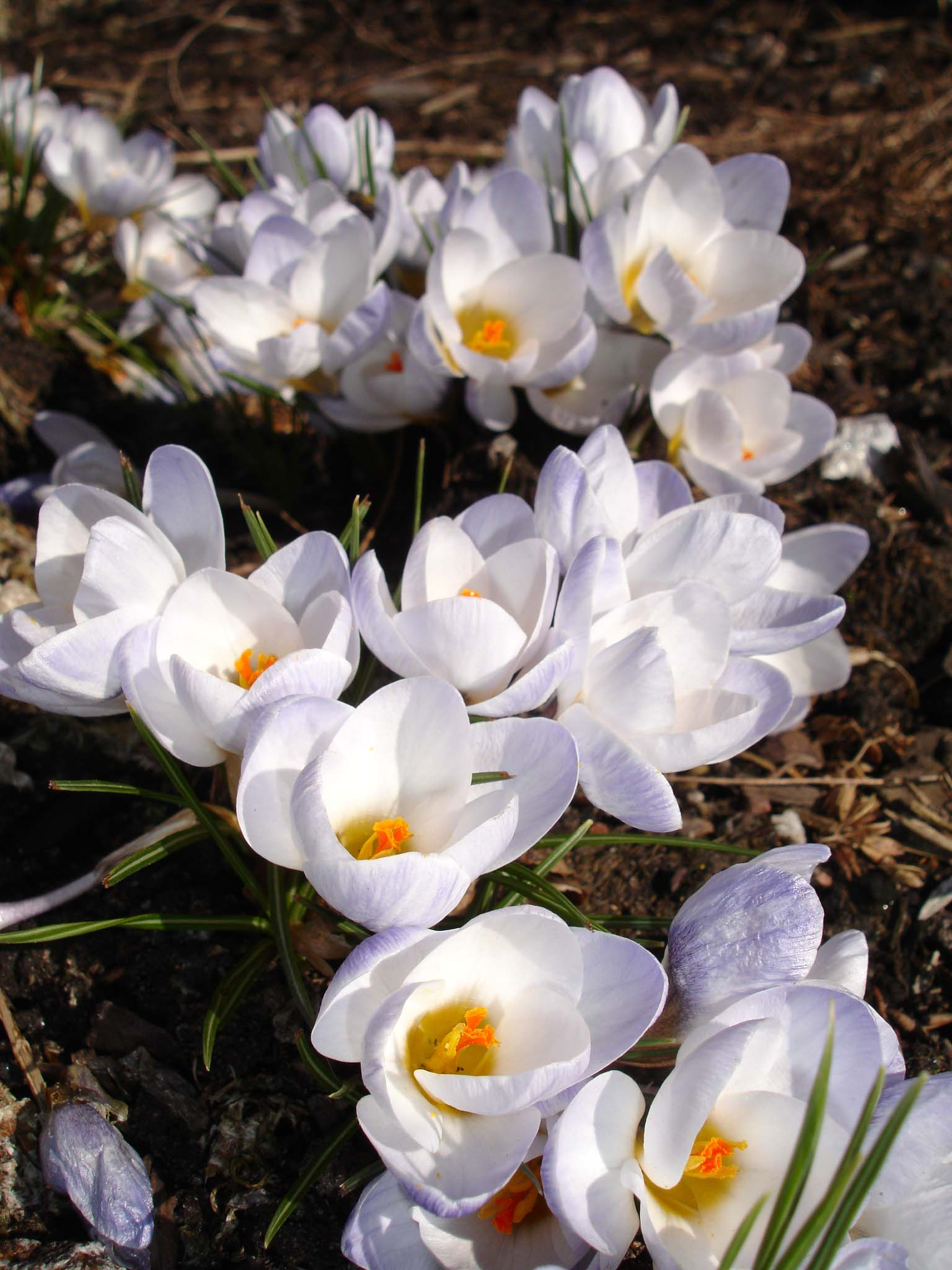 Crocus 'Prins Claus'